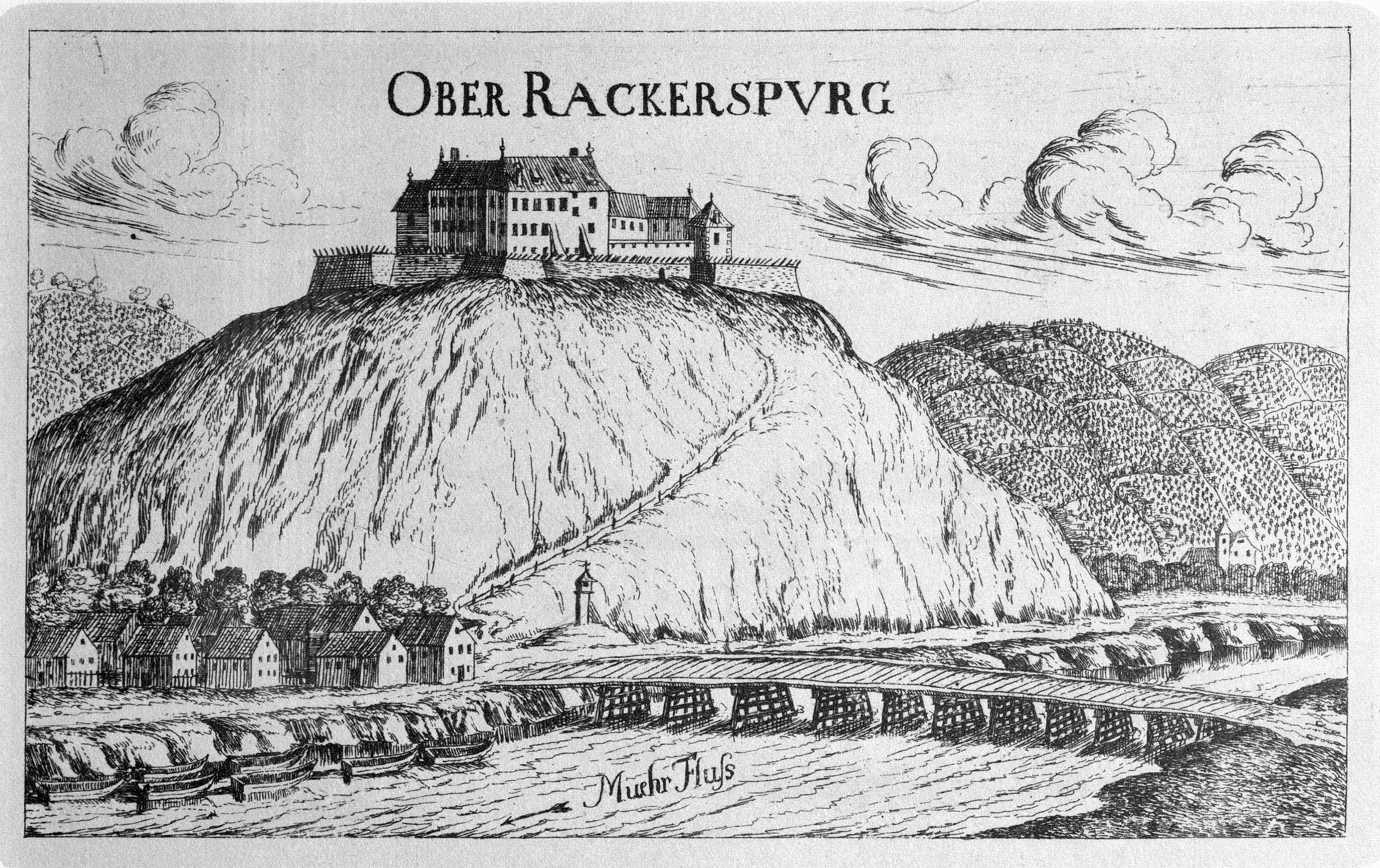 G. M. Vischers Käyserlichen Geographi, Topographia Ducatus Stiriae, Das ist: Eigentliche Delineation / und Abbildung aller Städte / Schlösser / Marcktfleck / Lustgärten / Probsteyen / Stiffter / Clöster und Kirchen / so es sich im Herzogthumb Steyrmarck befinden; Und anjetzo Umb einen billichen Preyß zu finden seynd Bey Johann Bitsch Universitäts Buchhandlern / Auff dem Juden=Platz bey der guldenen Saulen. Graz 1681 Die Nummerierung der Dateien folgt der alphabetischen Reihung der Ortsnamen und entspricht nicht dem Vischer-Register